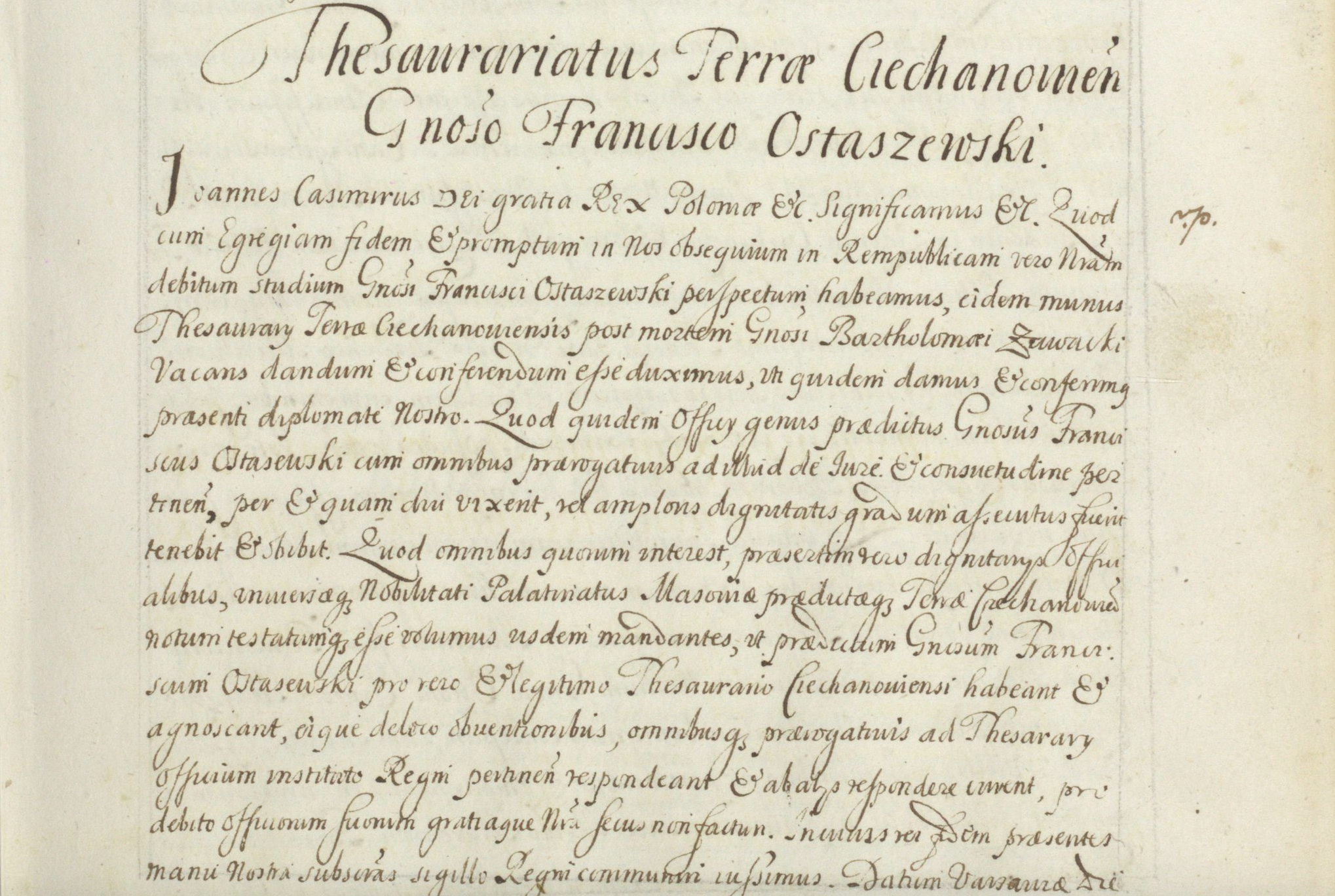 Nominacja Franciszka Ostaszewskiego z Ostaszewa na skarbnika ciechanowskiego. Metryka Koronna Nr 201, k. 19 w Archiwum Akt Danych w Warszawie